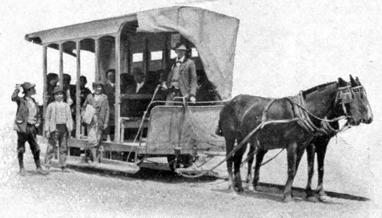 Tranvía del Ferrocarril Urbano de Coquimbo